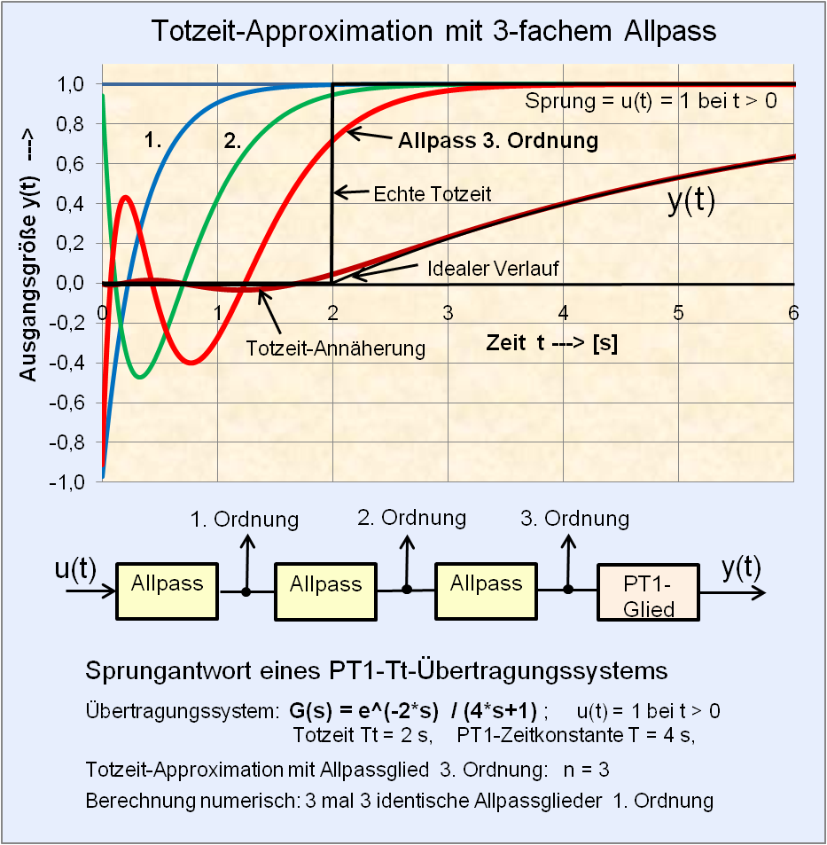 Annäherung an die Totzeit mit 3-fachem Allpass